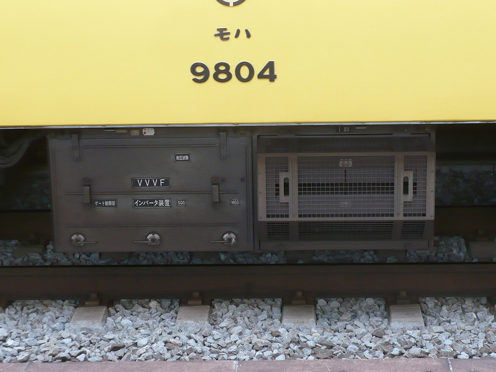 西武9000系のVVVFインバータ